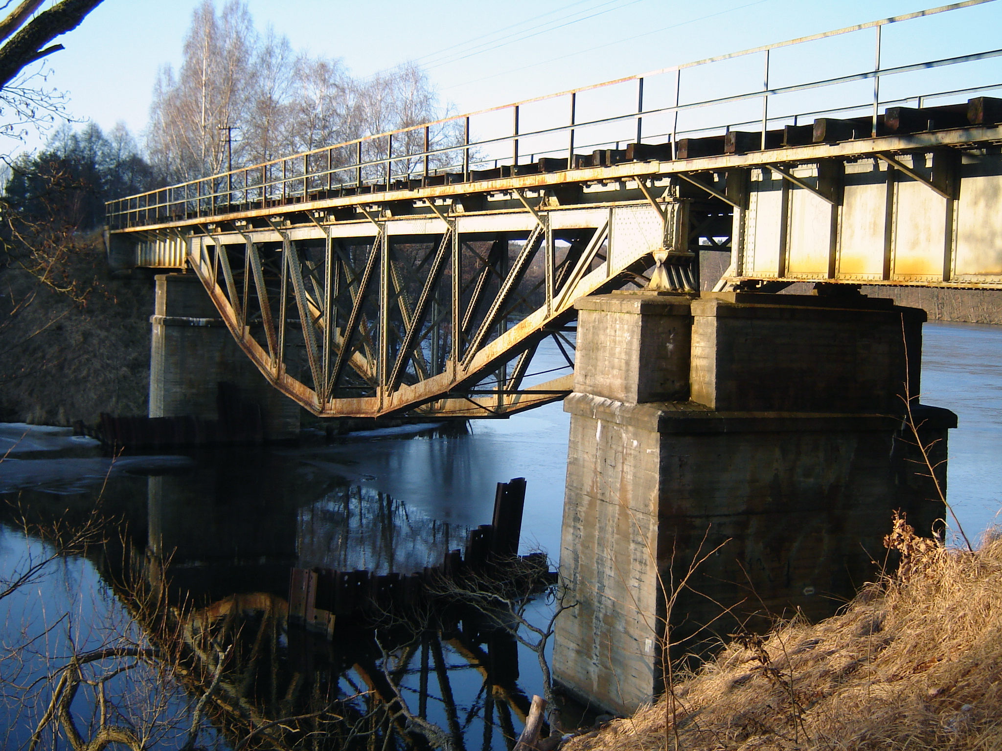 Most kolejowy na Wdzie w Tleniu.